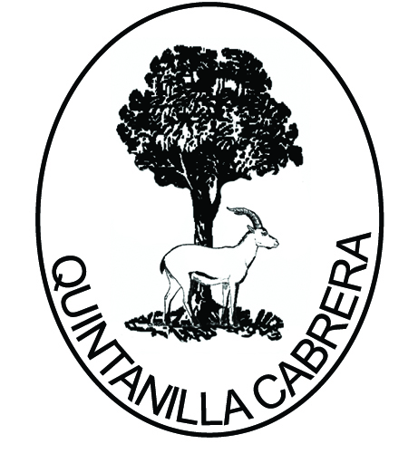 Escudo de armas de Quintanilla Cabrera